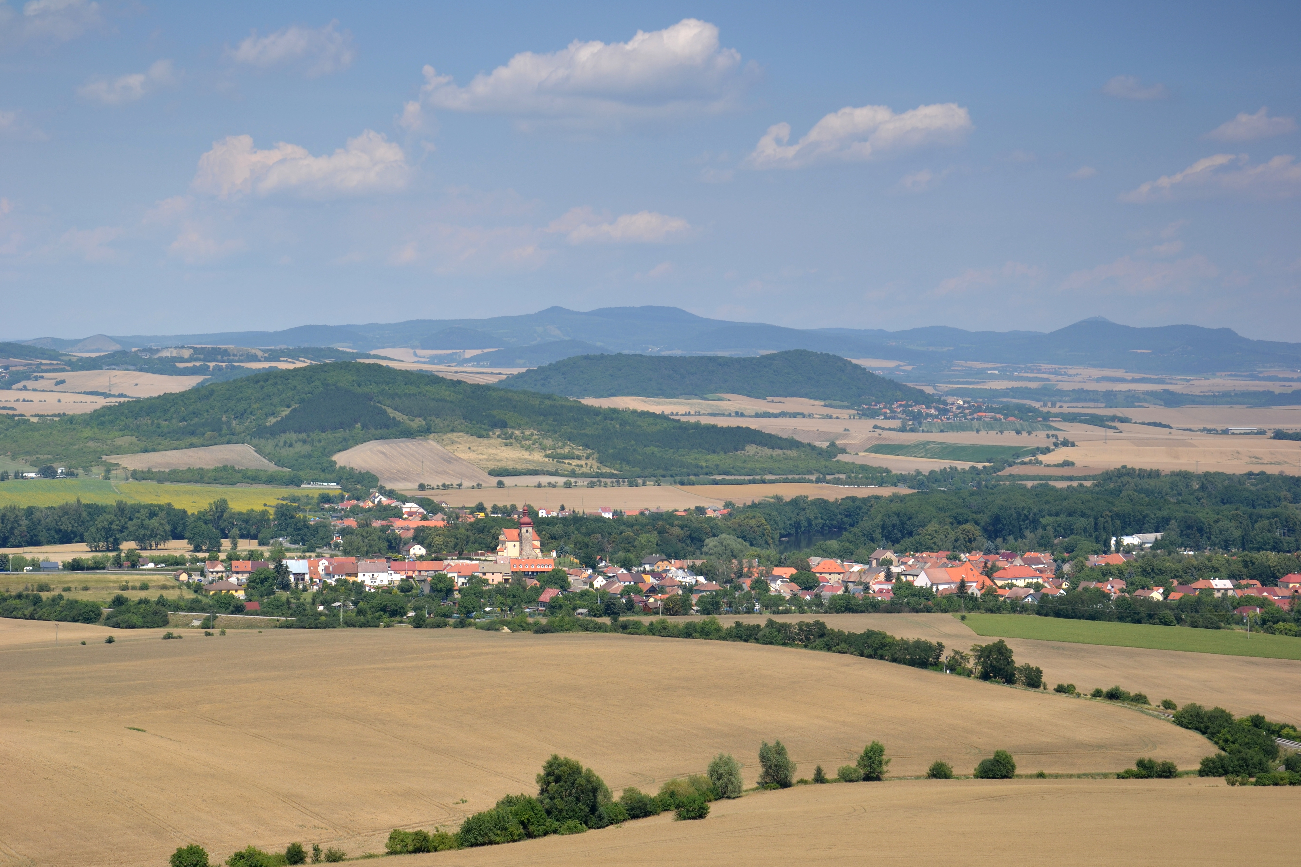 Blšanský chlum – pohled na Černčice